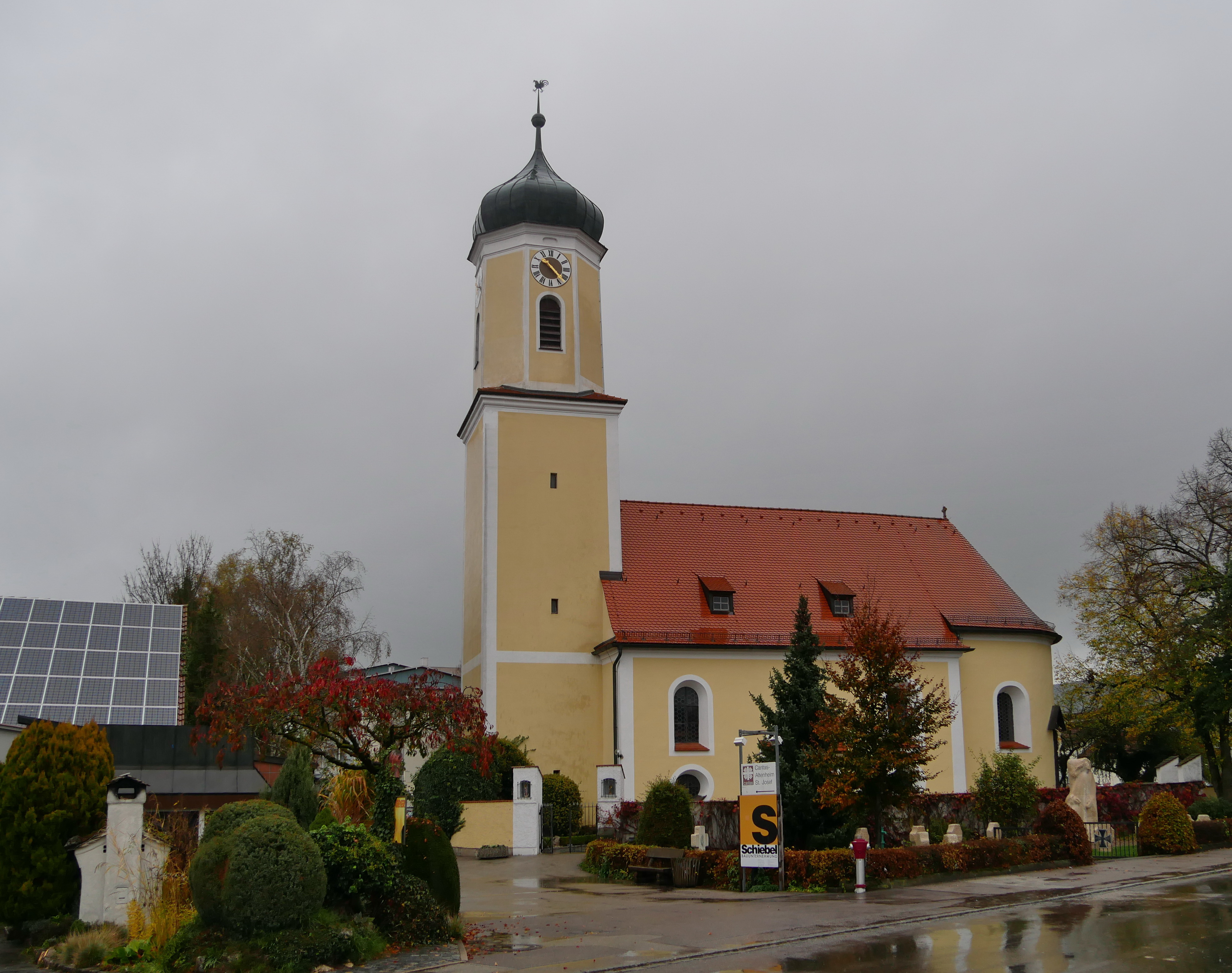 Denkendorf (Obb.), Hauptstr. 24, Katholische Pfarrkirche St. Laurentius mit westl. Toreinfahrt. Ansicht von SSW